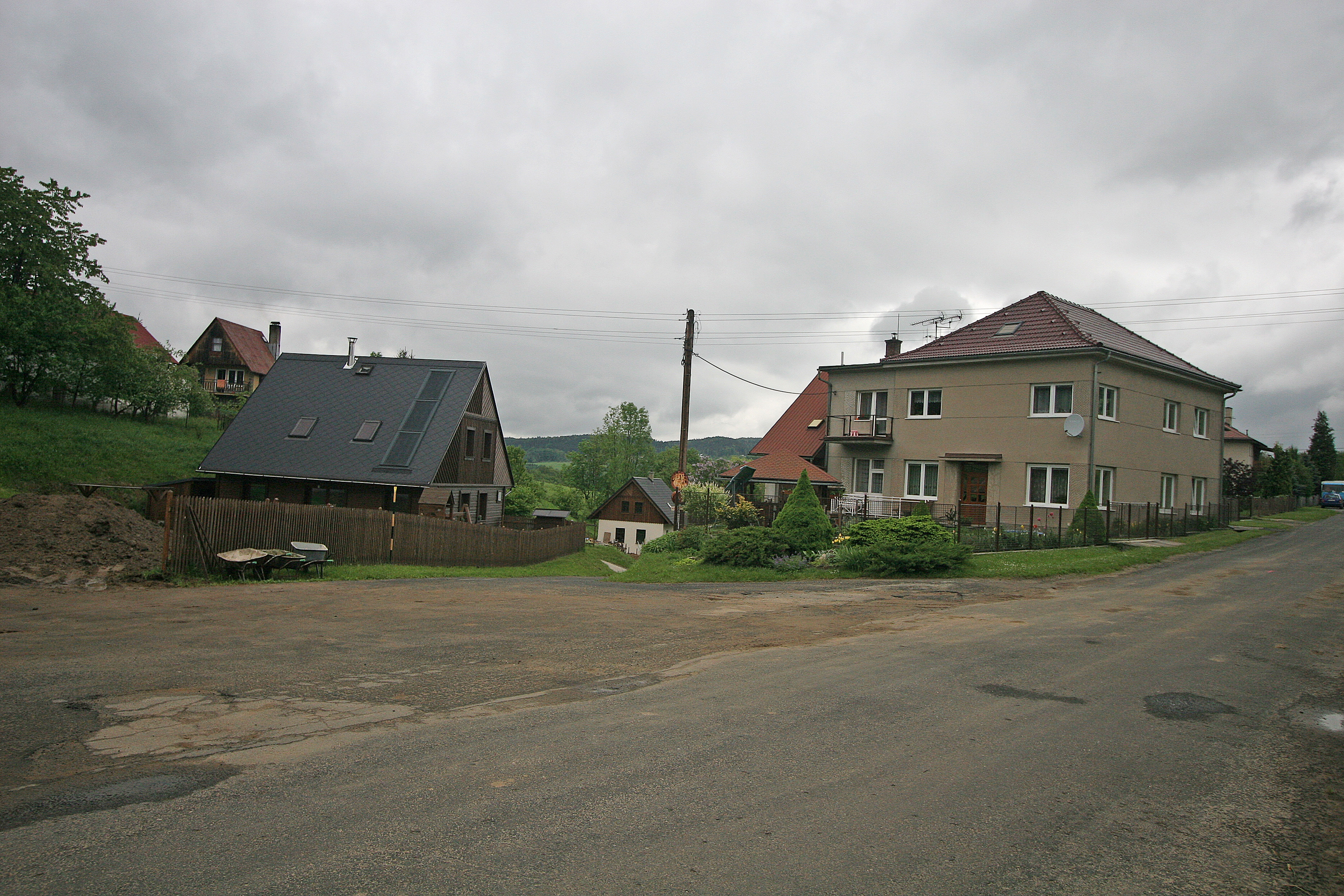 Klokočí čp. 10